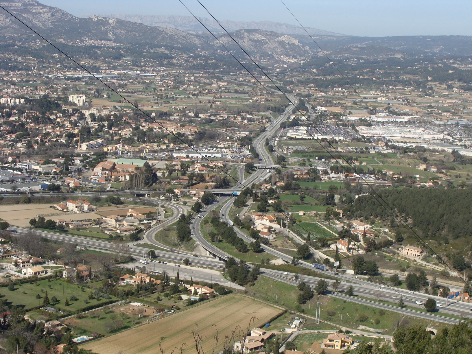 L'échangeur autoroutier A50/A52 à Aubagne (Bouches-du-Rhône). Au premier plan l'A50, reliant Marseille (à gauche) à Cassis et Toulon (sur la droite); dans l'axe central l'A52, montant vers Pont-de-l'Étoile et l'A8.